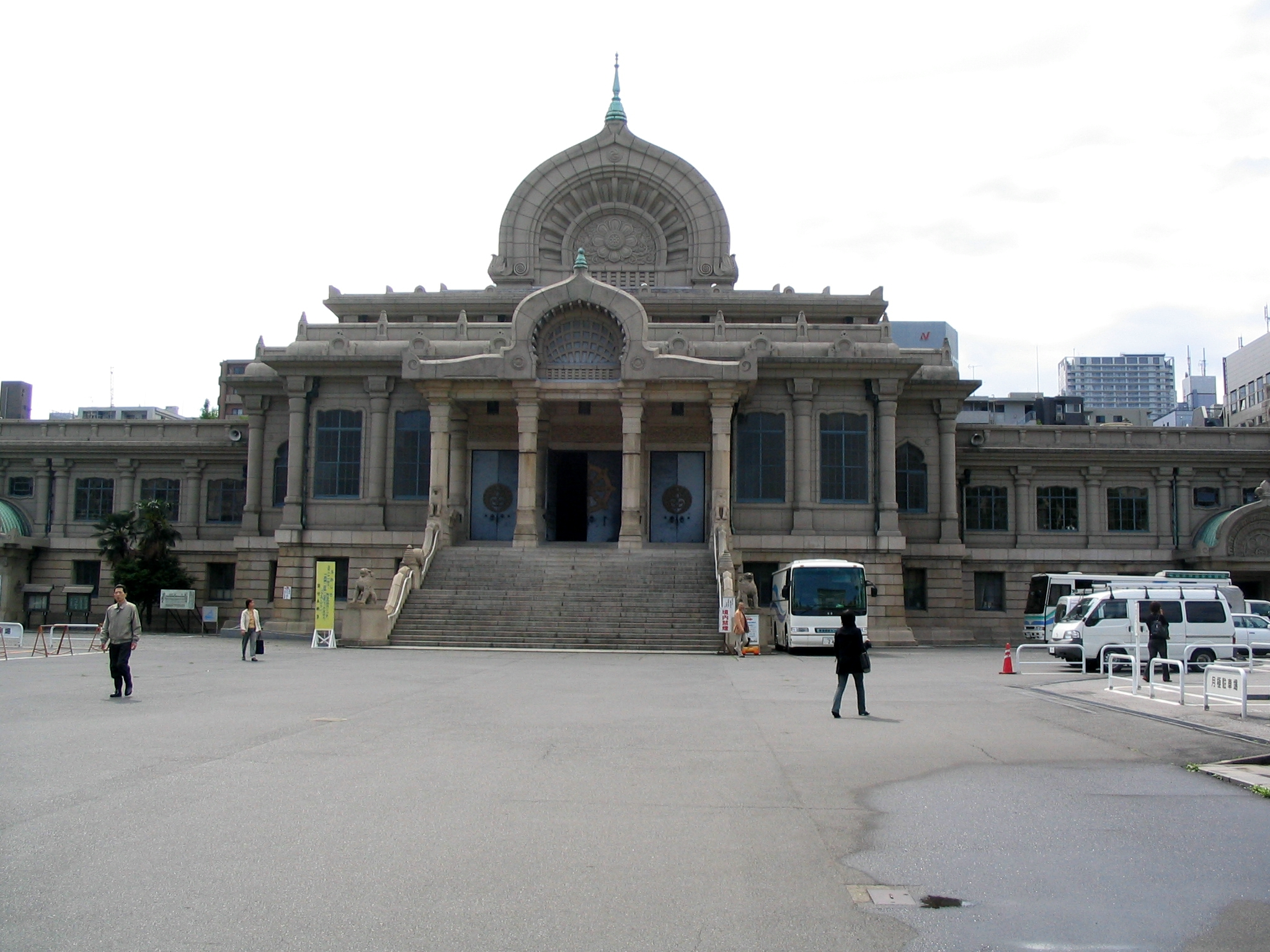 Tsukiji Honganji Temple, Tokyo, Japan